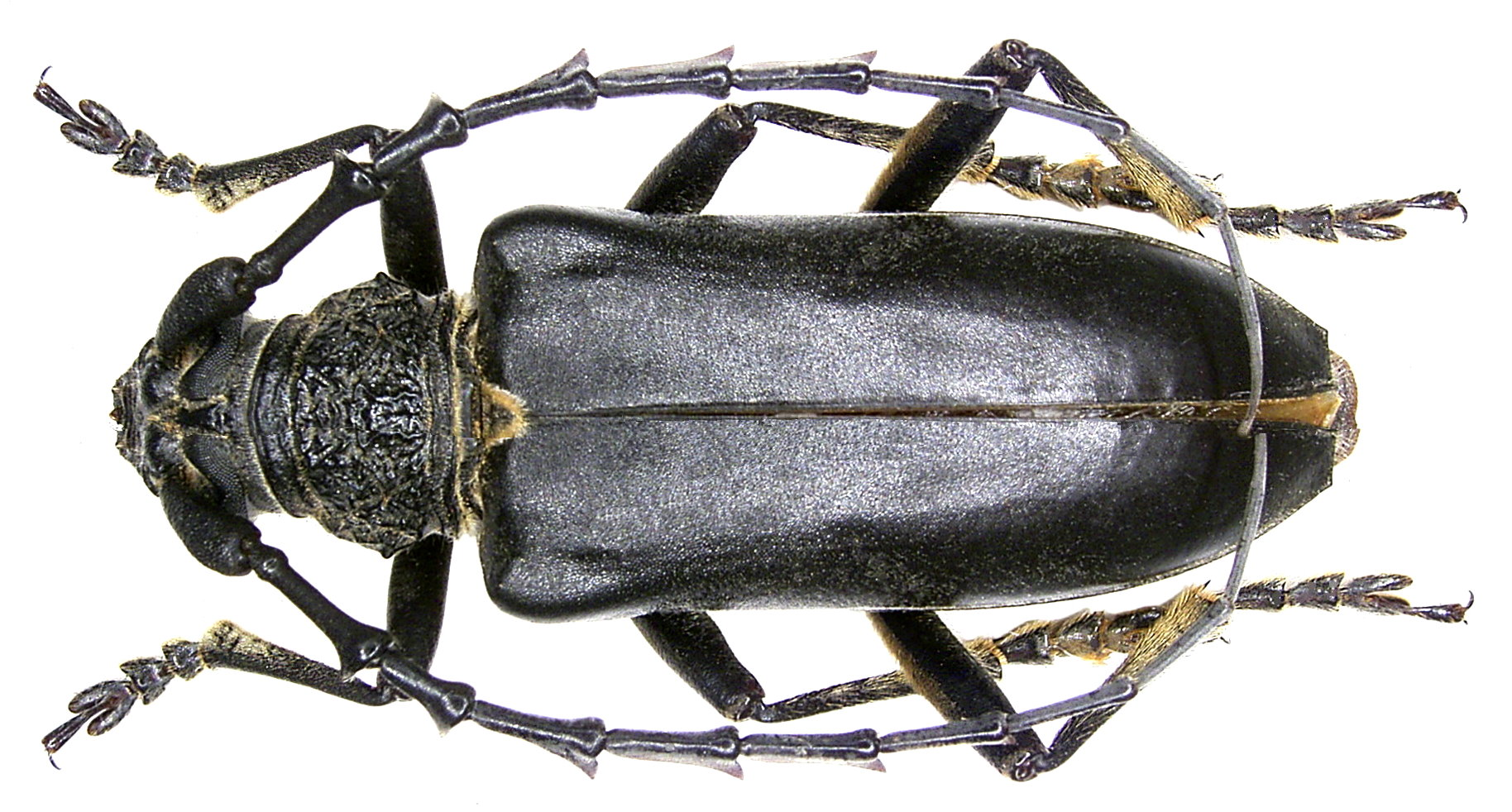 Familie: Cerambycidae Groesse: 26-35 mm Fundort: Kasachstan, Alma Ata, Boguty-Gebirge leg. Lukhtanov, 1993; det. A.Weigel Photo: U.Schmidt, 2006